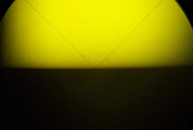 Abbe-Refraktometer Strichkreuz - die Grenzlinie der Totalreflexion wird auf das Strichkreuz eingestellt